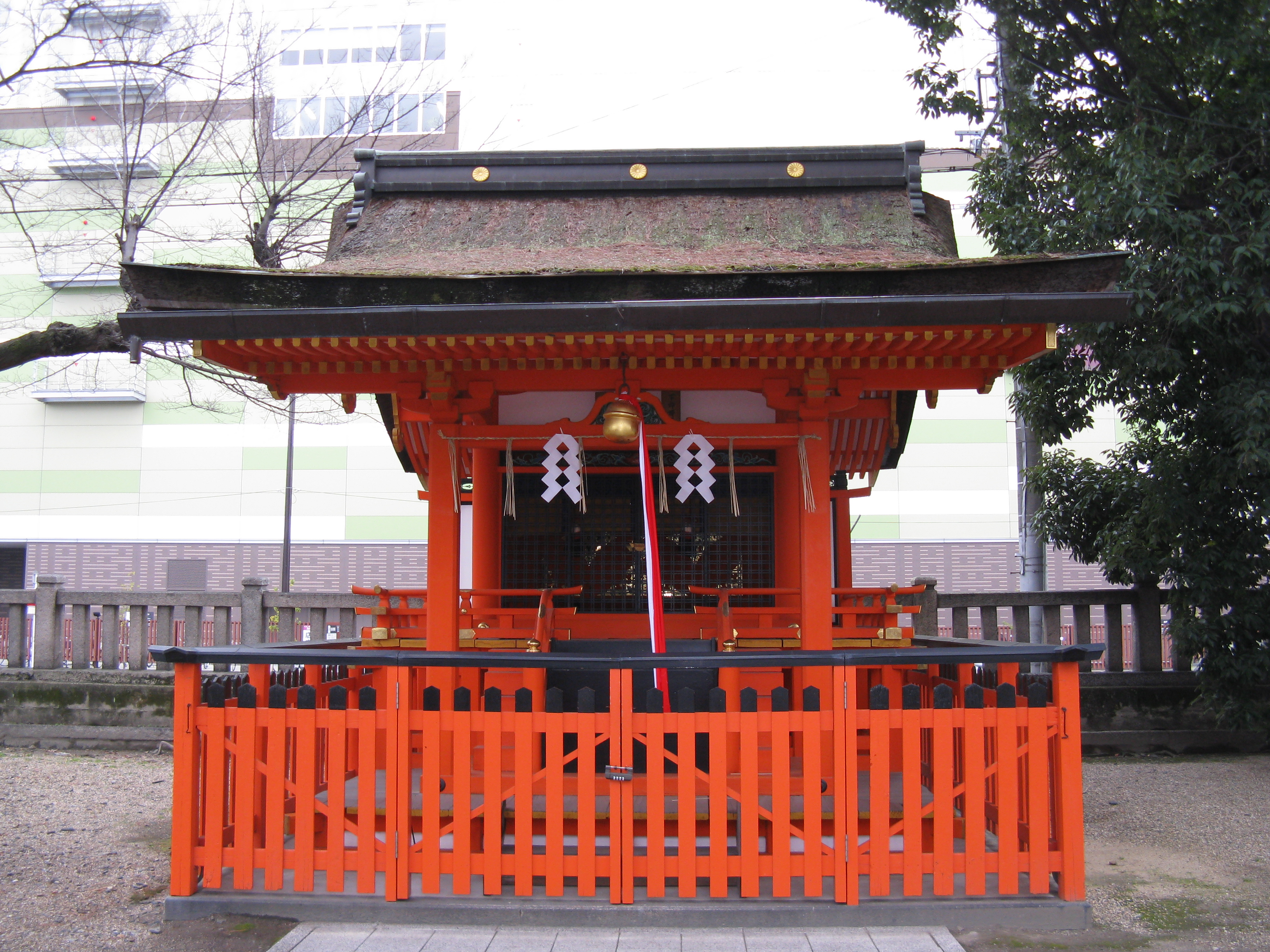 伏見稲荷大社 御旅所